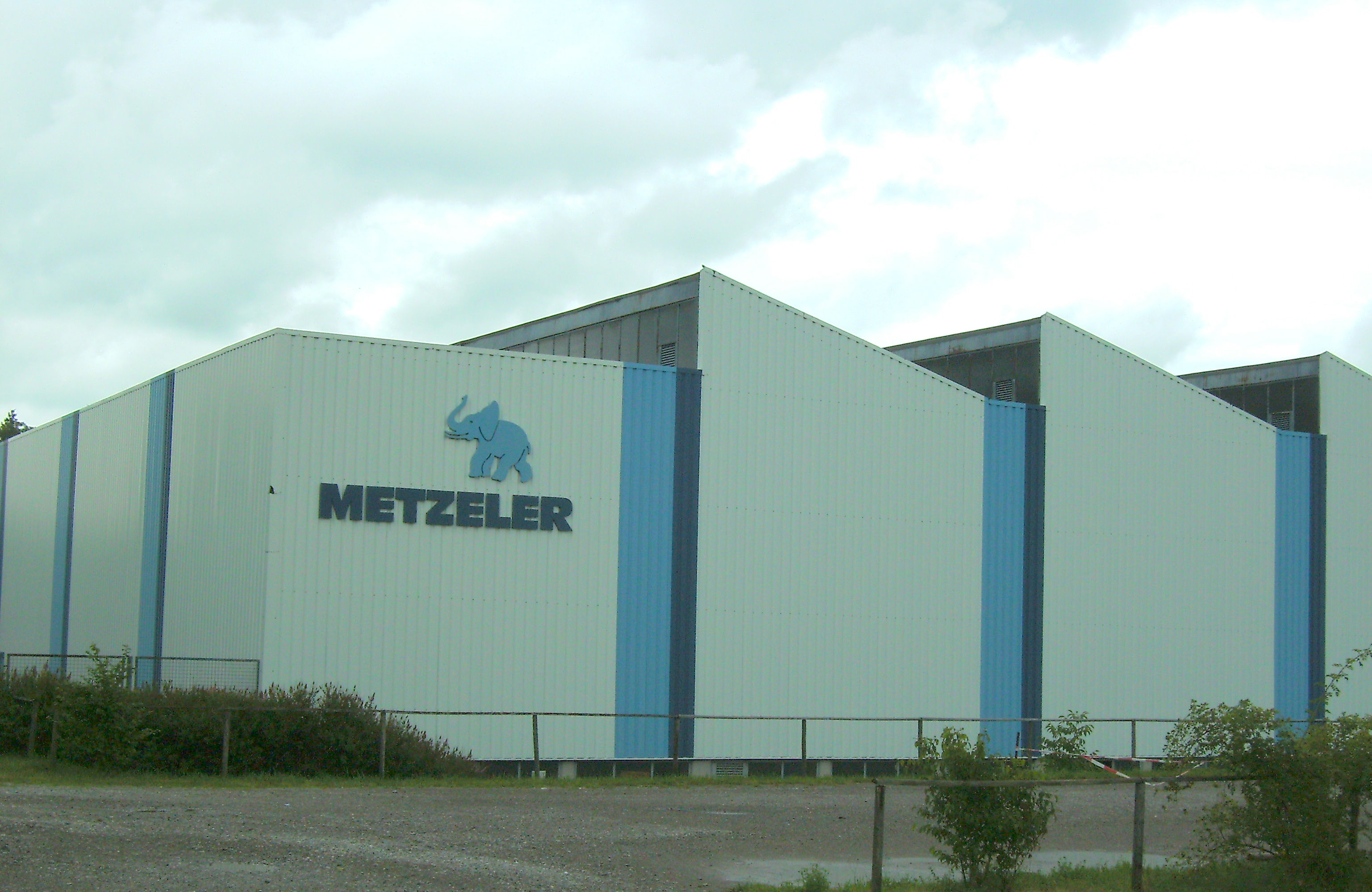 Metzeler Memmingen Nordseite